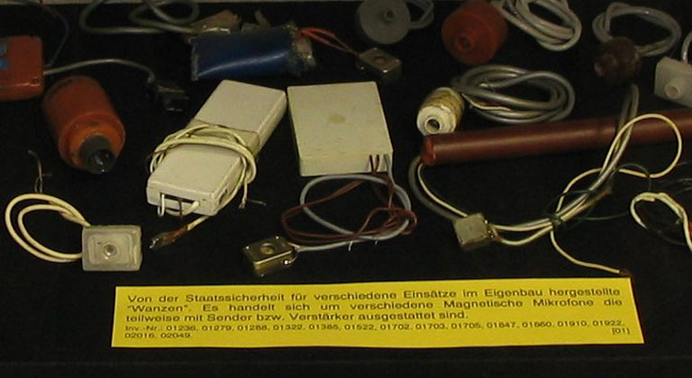 Ausschnitt von Bild:MfS_wanzen.jpg